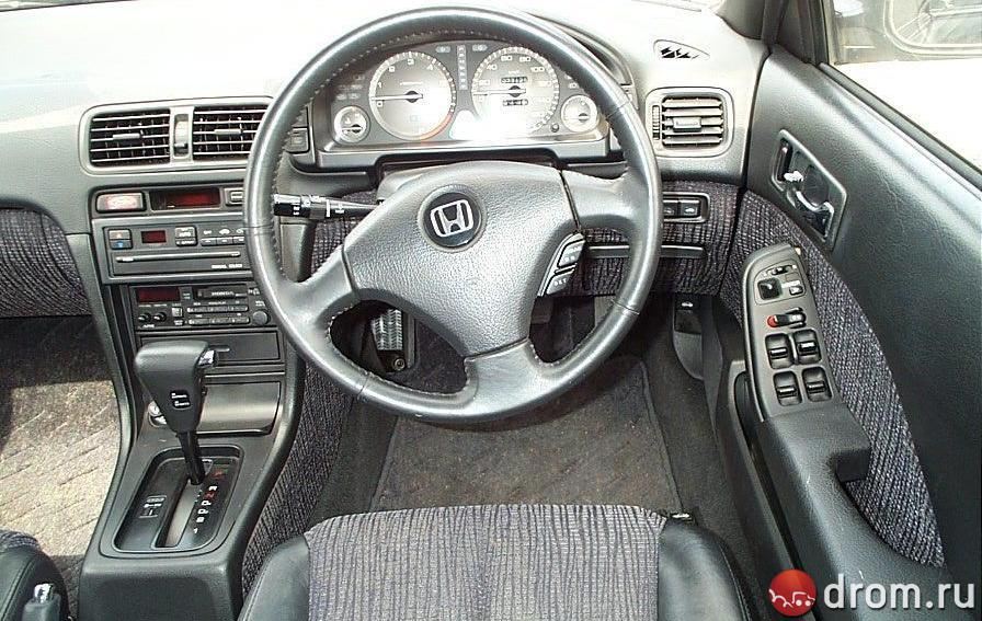 Honda ascot innova 1992 года